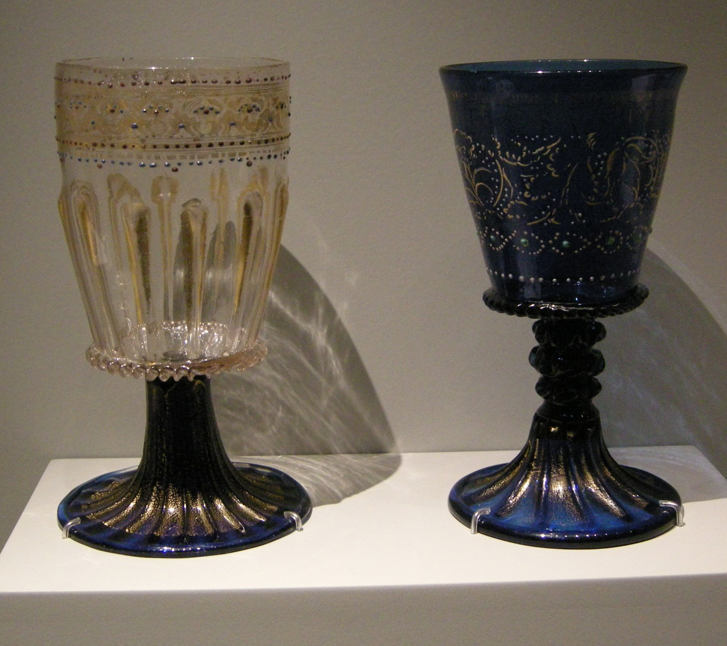 Vetro veneziano, bicchieri, 1500 ca.